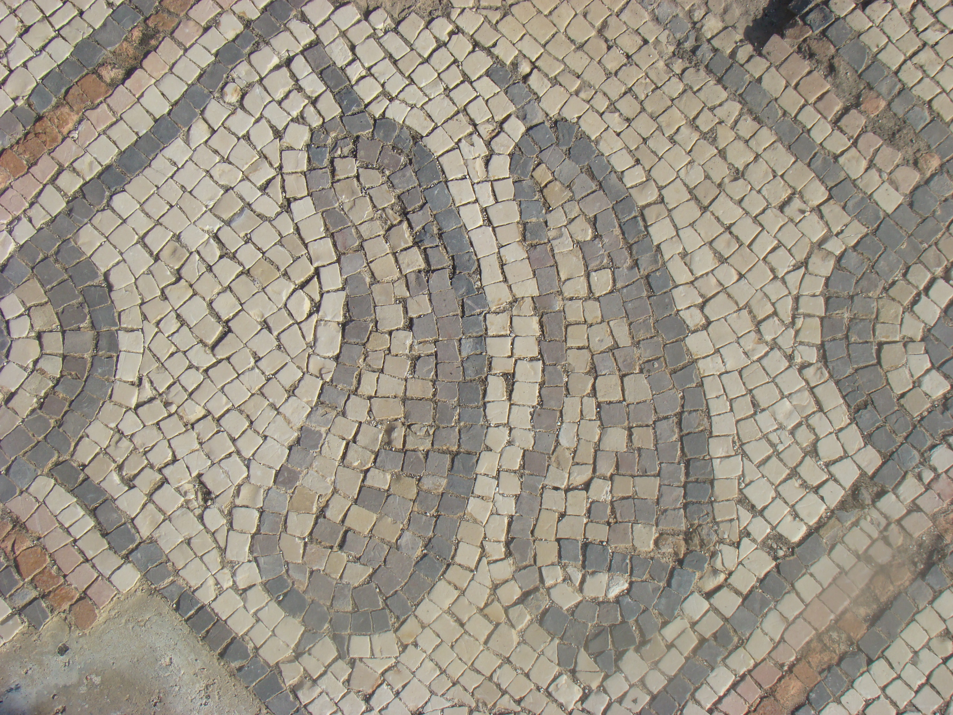 Ajjour